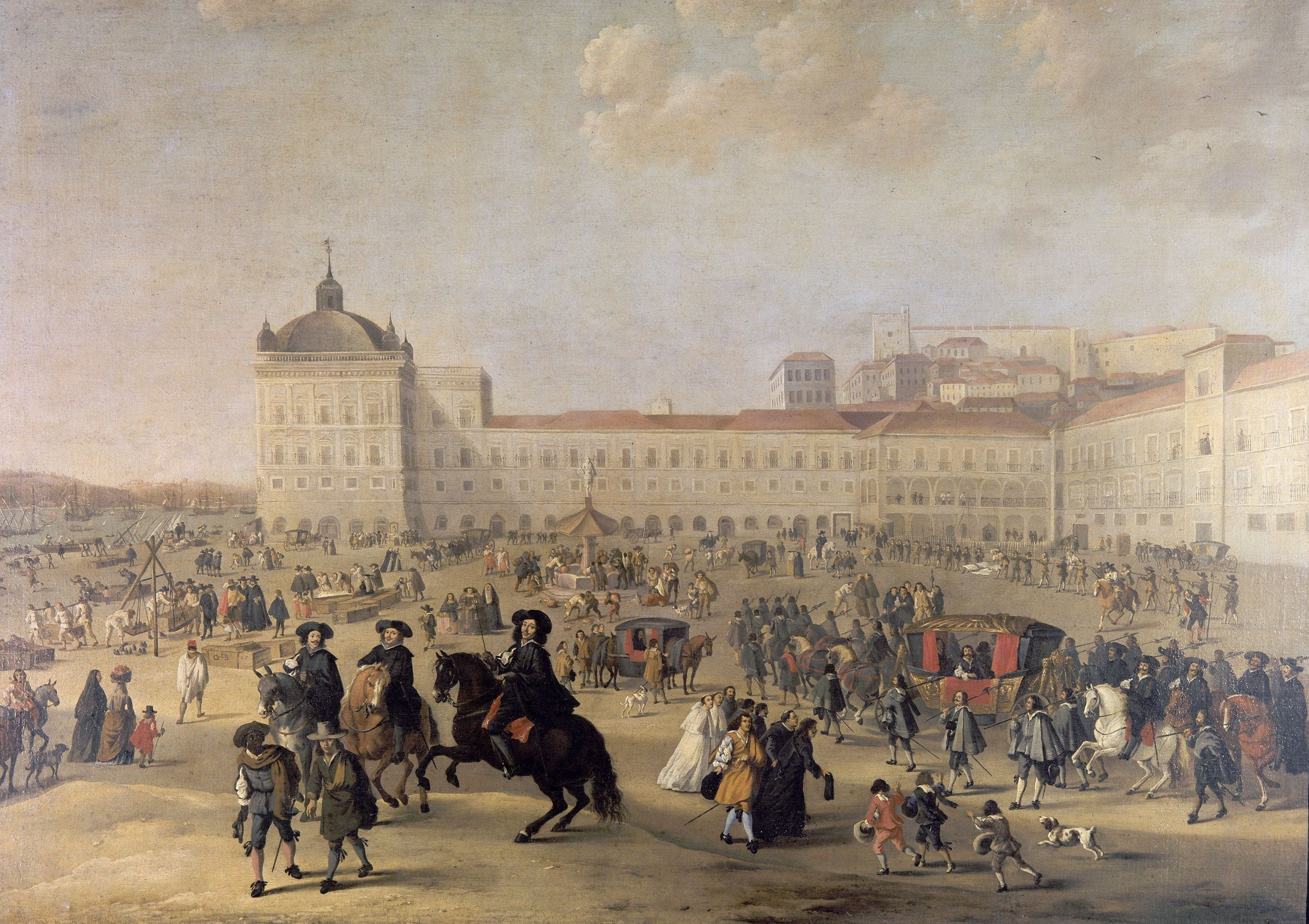 Na pintura são visíveis o Paço da Ribeira, o Convento de São Francisco da Cidade e o cais. Na praça há fidalgos, comerciantes, eclesiásticos e até soldados pois à época ainda decorria a Guerra da Restauração.